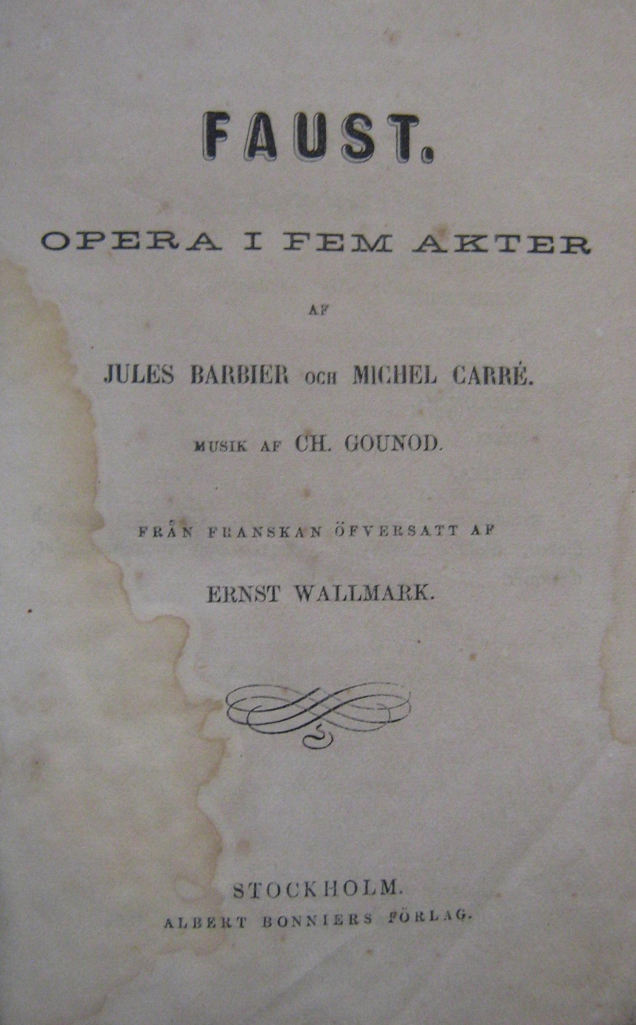 Gounods Faust i svensk översättning, tryckt hos Hörbergska boktryckeriet, 1862.